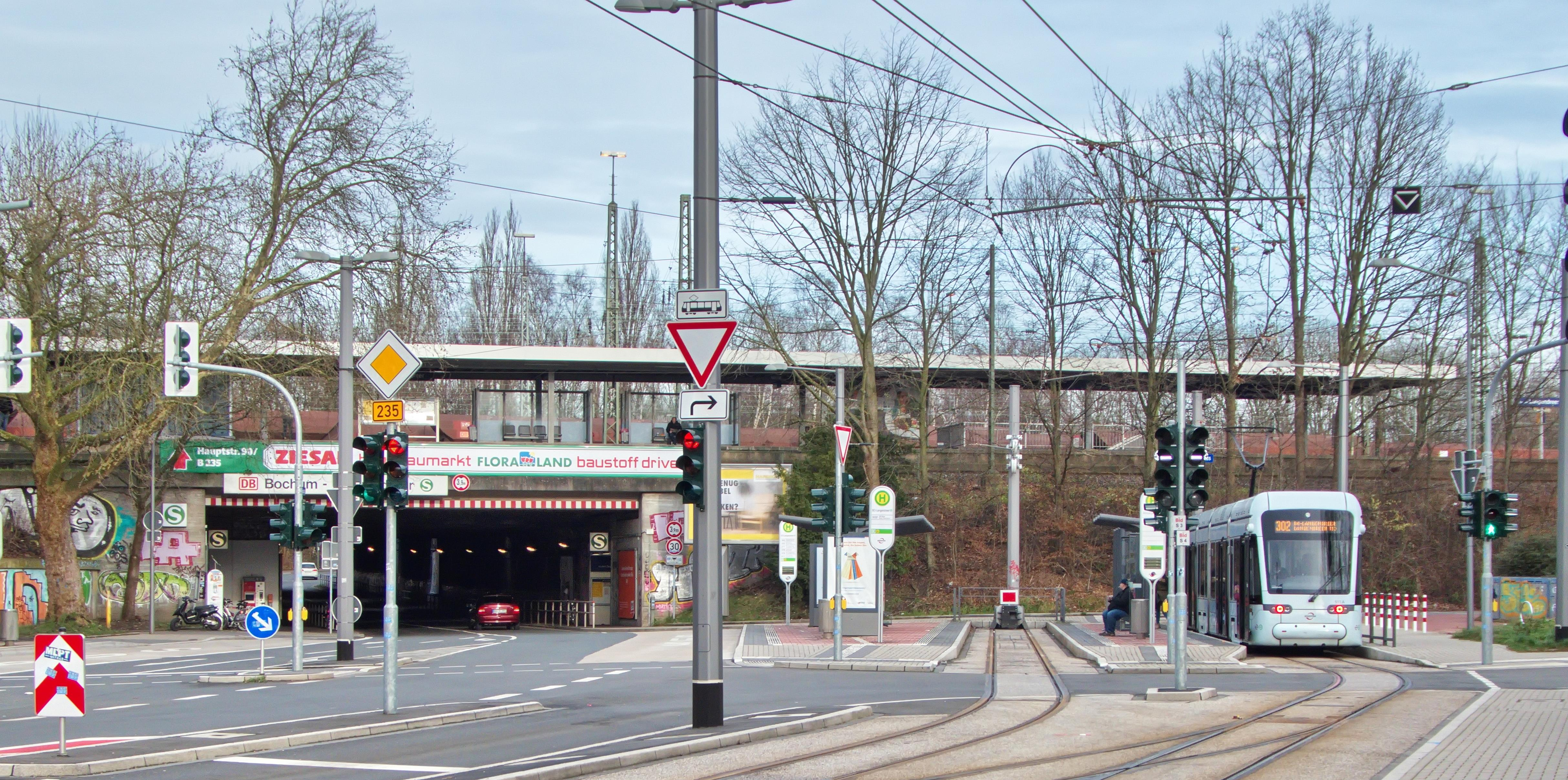 Bahnhof Bochum-Langendreer mit Straßenbahnhaltestelle